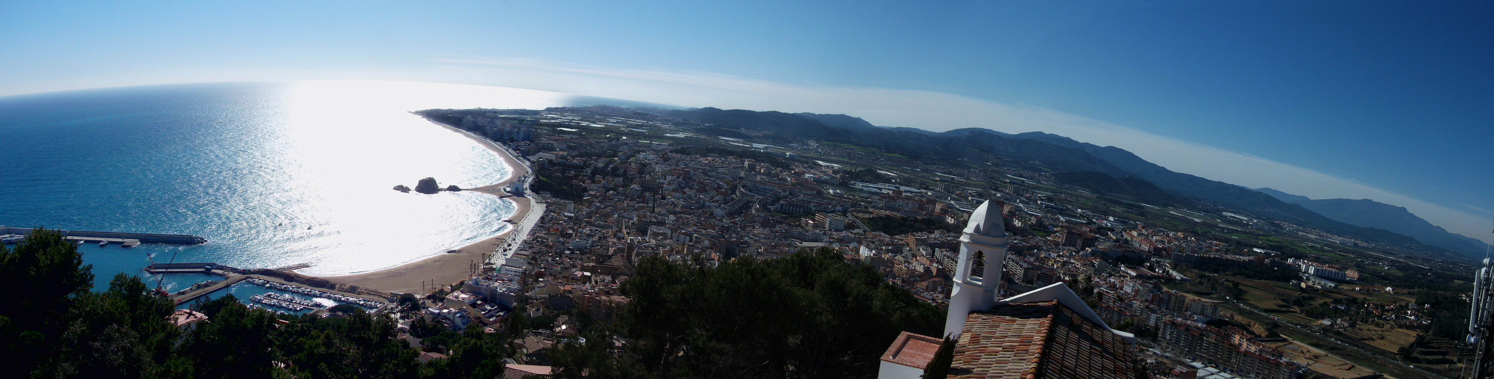 Imagen de Blanes desde el Castillo de San Juan. Se observa el mar Mediterráneo, desembocadura del río Tordera, sierras del Montnegre y Montseny, y pueblos del entorno (Tordera, Palafolls, Malgrat de Mar).